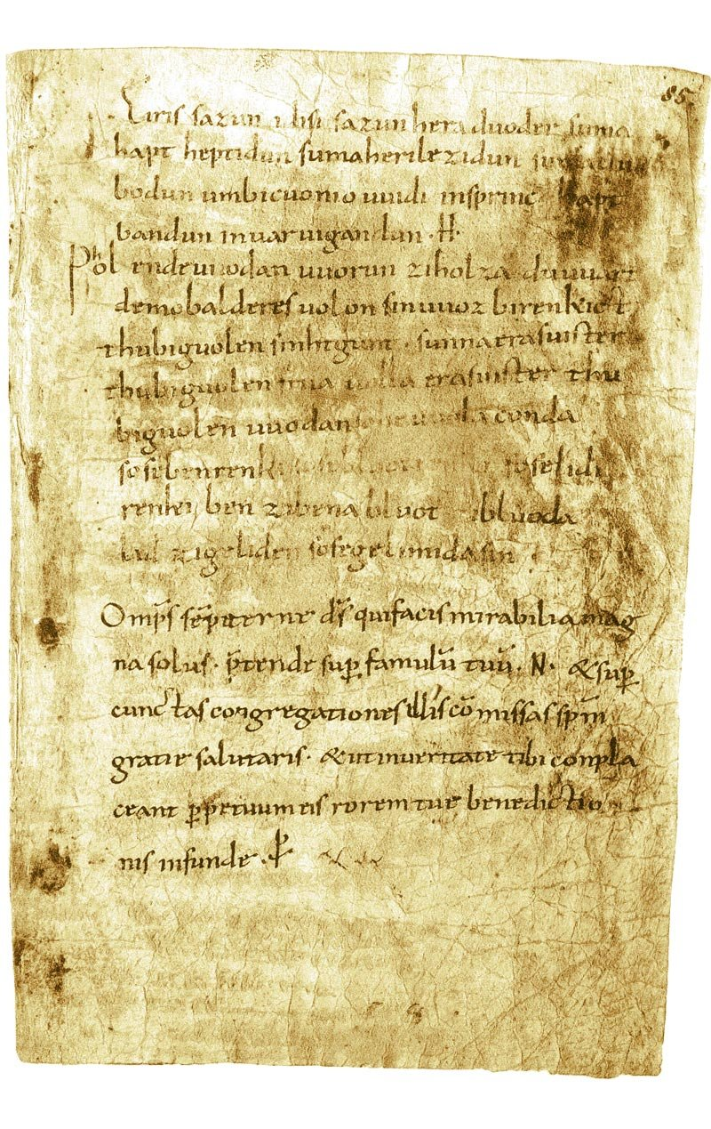 Merseburger Zaubersprüche. Farbbild von Cod. 136, folio 85r, Domstiftsbibliothek Merseburg.